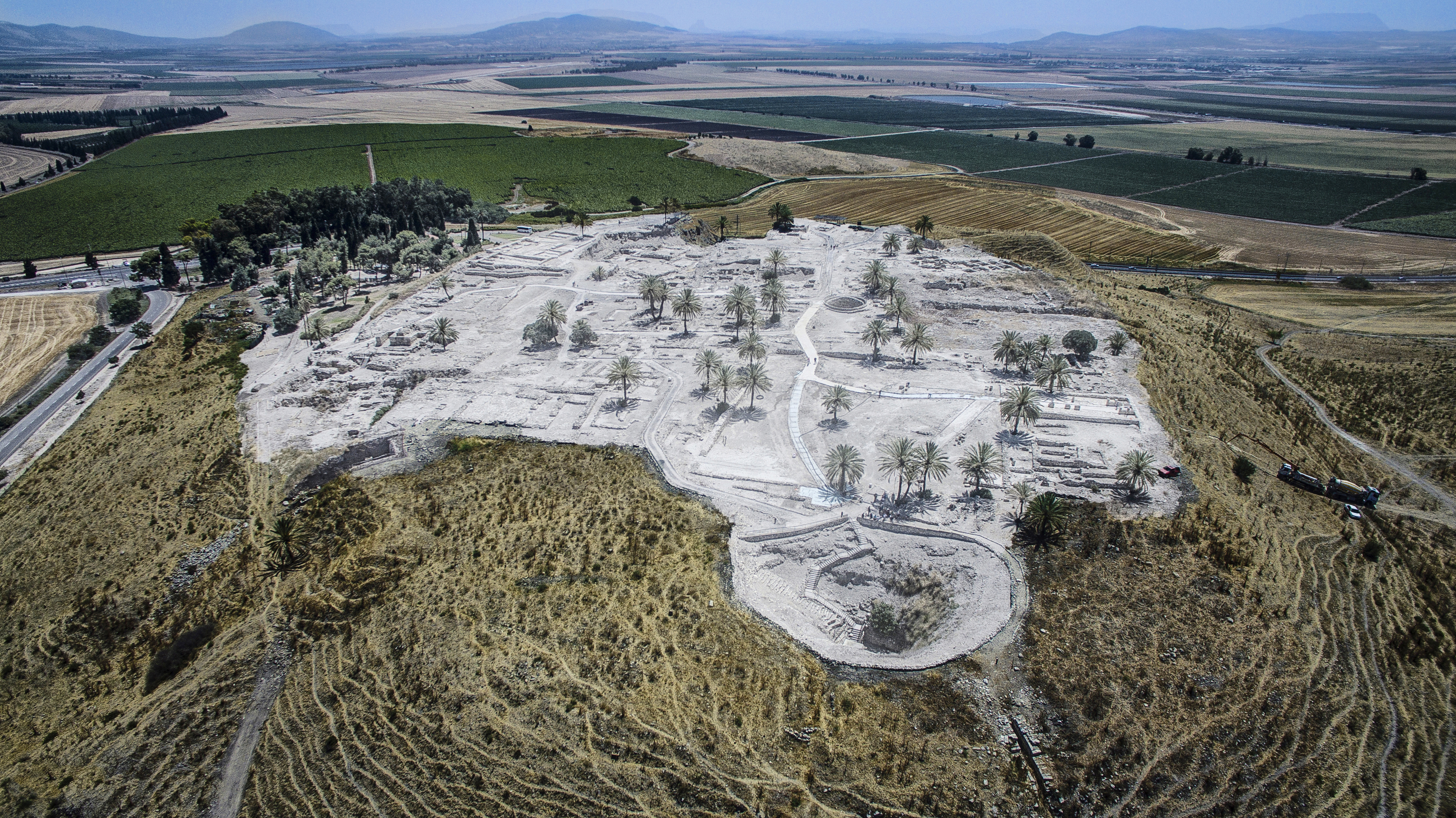 תל מגידו (ערבית تل المتسلم תל אל-מֻתַסַלִם - "תל המושלים") הוא מהחשובים ומהמרשימים באתריה הארכאולוגיים של ישראל. ראשית ההתיישבות בו החלה באלף הרביעי לפנה"ס. בשנת 2005 הוכר האתר כאתר מורשת עולמית על ידי אונסק"ו.